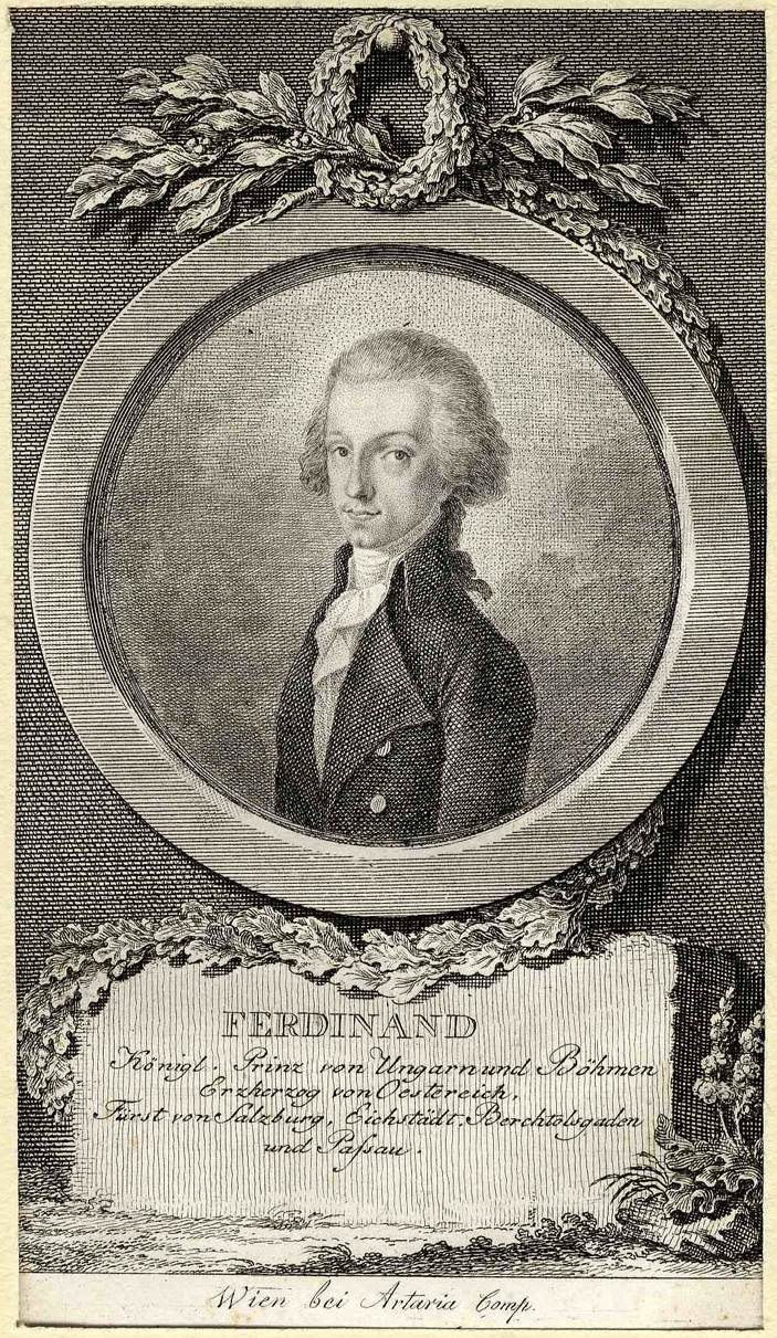 Kurfürst Ferdinand von Salzburg, Kupferstich; Wien, bei Artaria, 1803